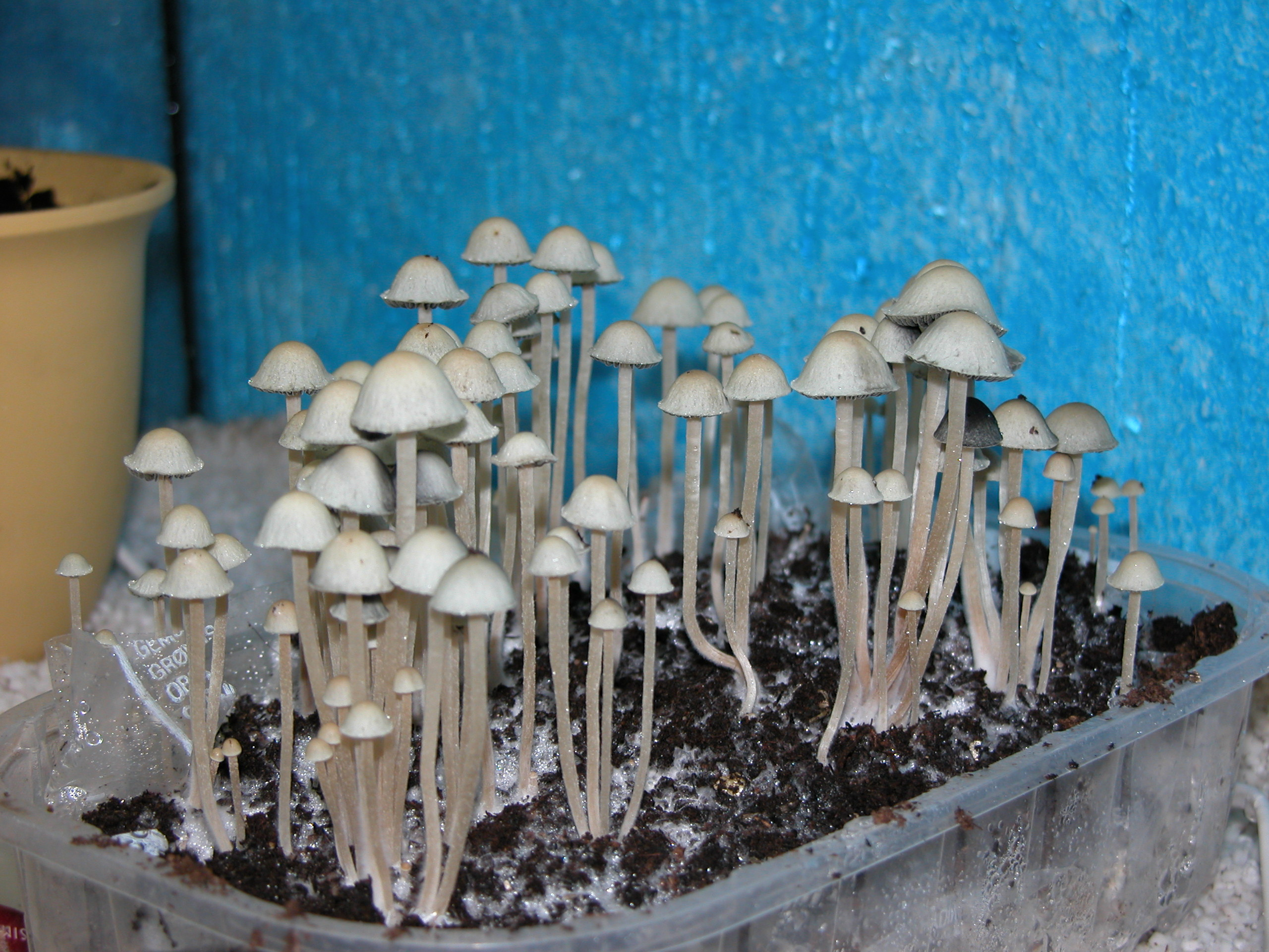 Panaeolus cyanescens